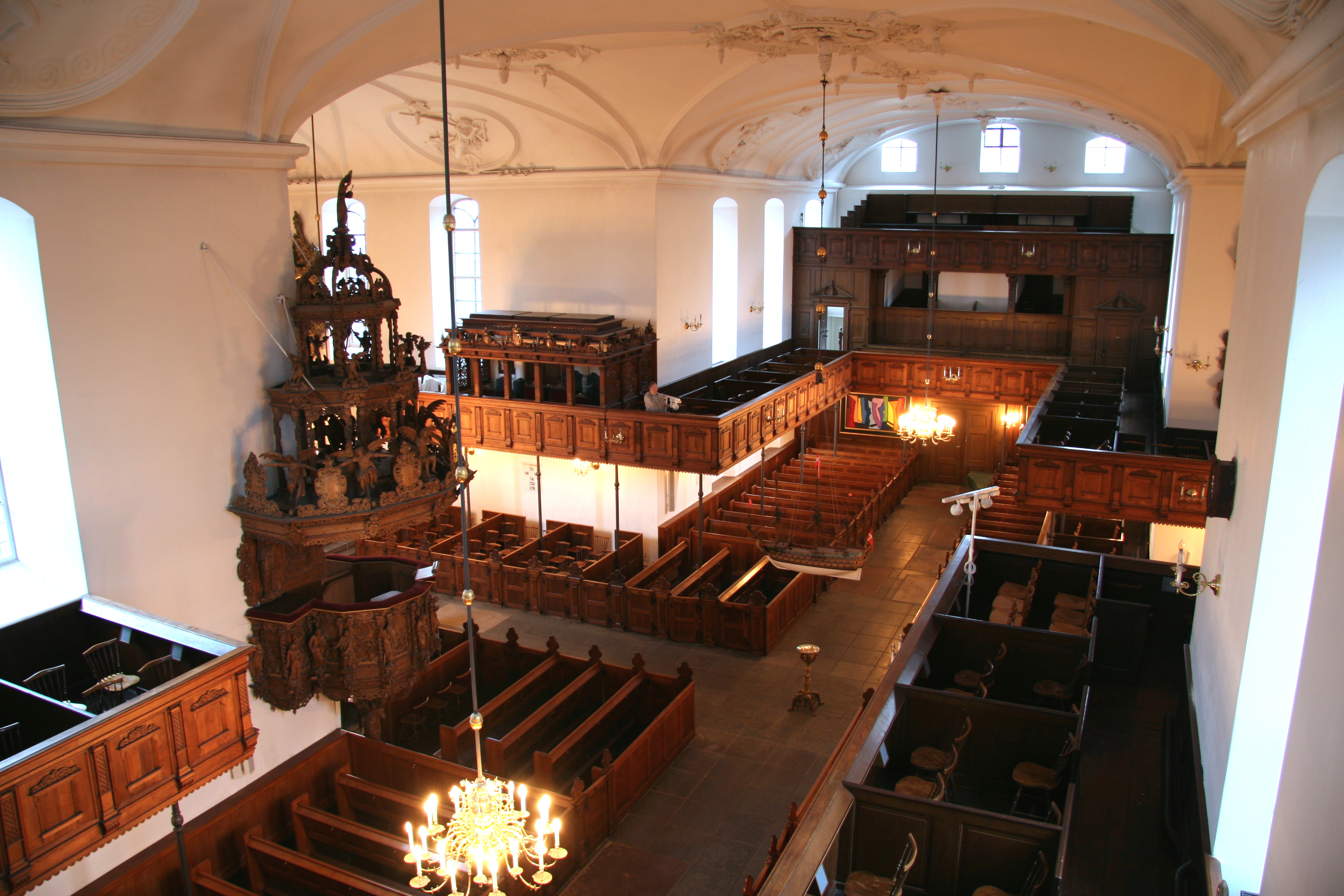 Holmens Kirke, Copenhagen, Denmark . Interiør fra Matrosloftet.